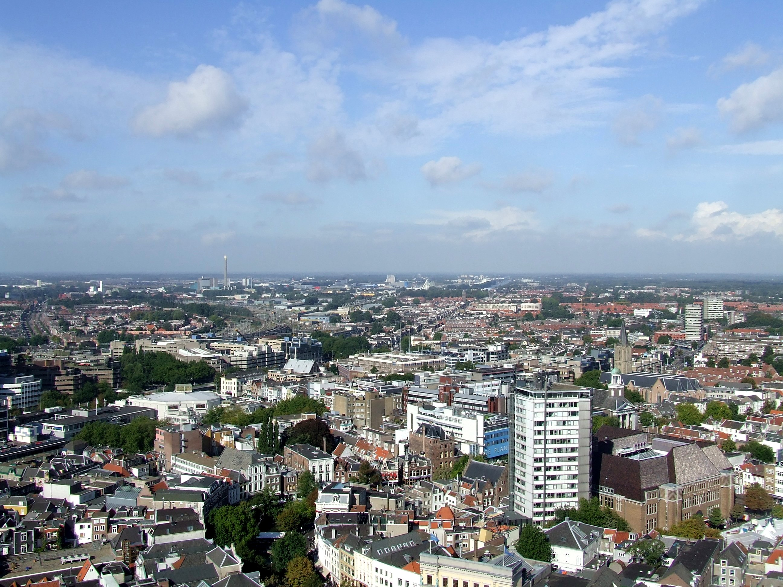 zelfgemaakte opname door Paulus_2 3 okt 2006 15:25 (CEST)